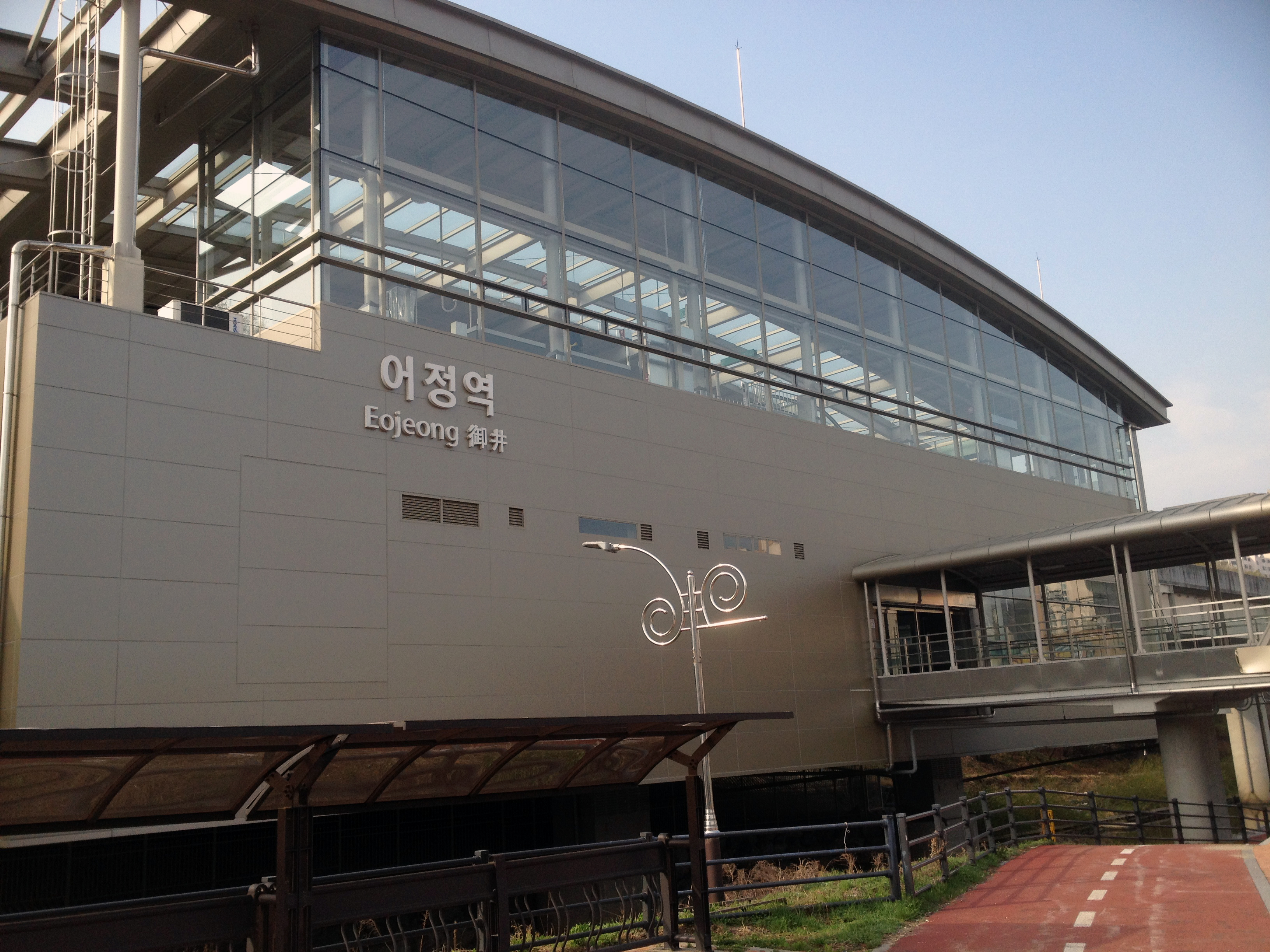 어정역 역사